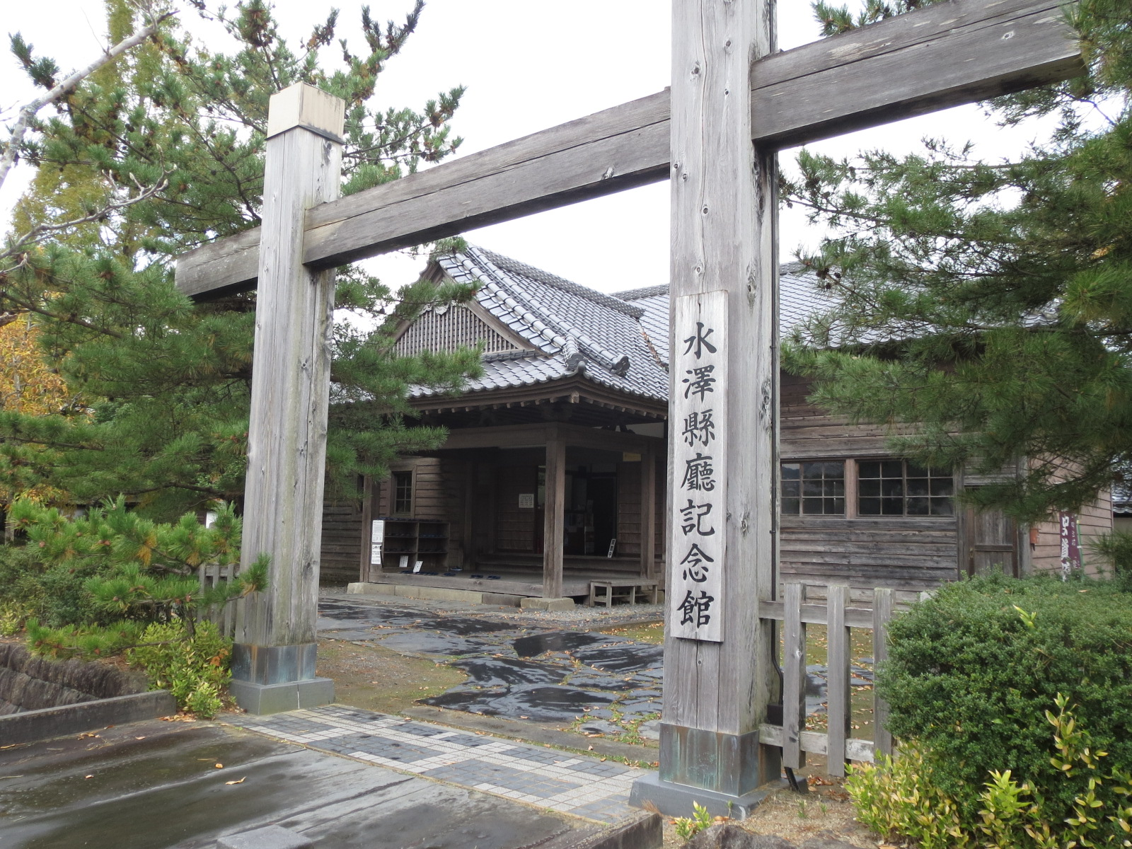 かつて水沢県庁、登米区裁判所等に使われた建物。現在は旧水沢県庁記念館となっている